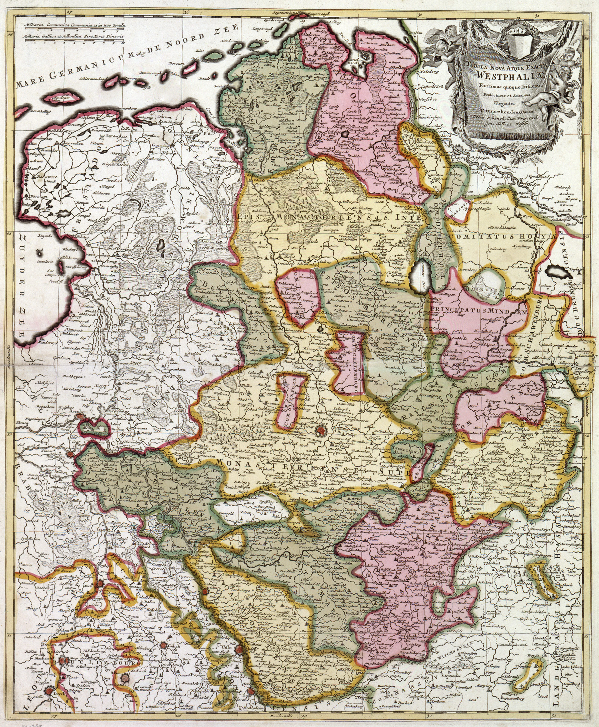 Historische Karte vom Reichskreis Niederrhein-Westfalen im Jahre 1710